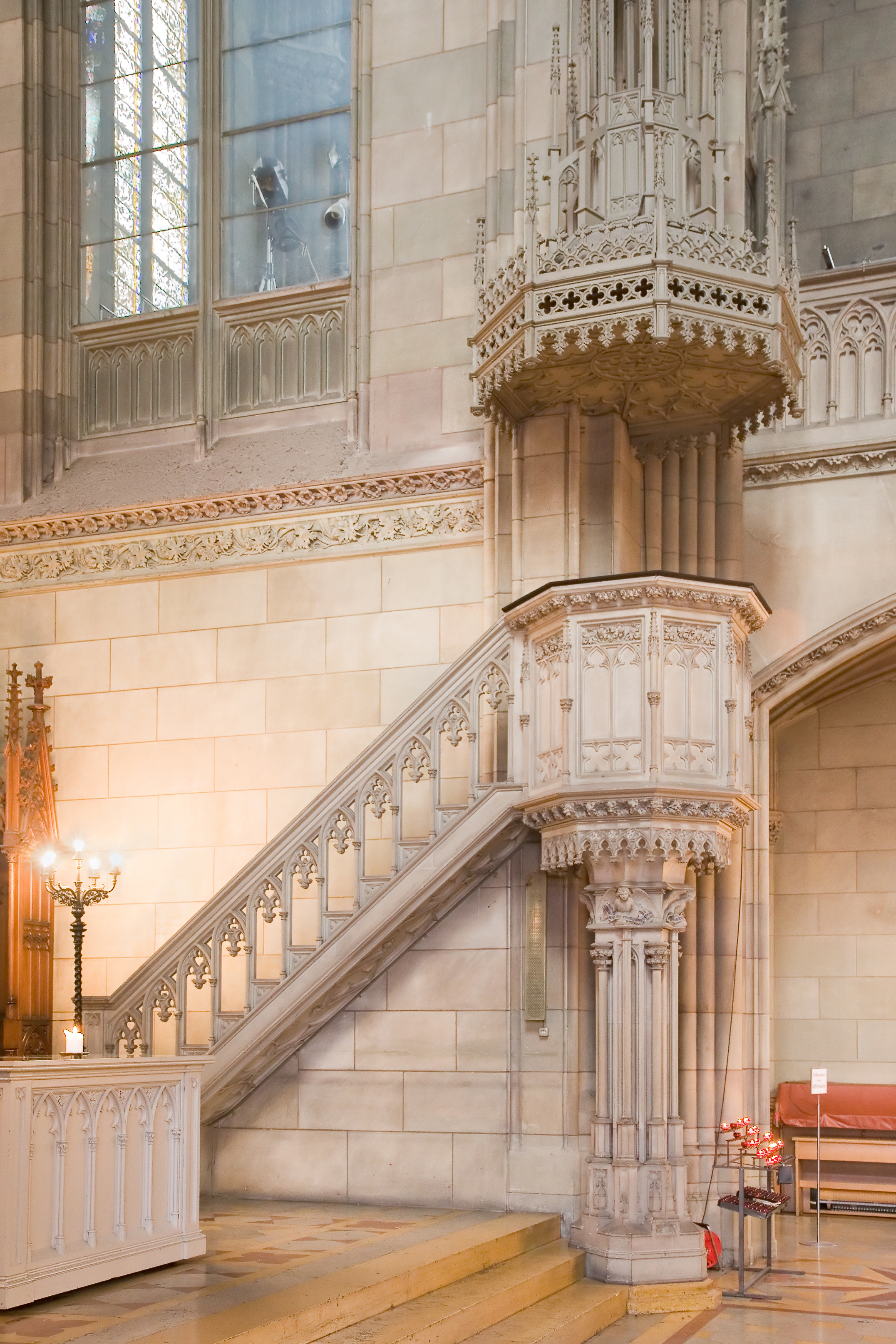 Kanzel aus Stein in der Elisabethenkirche in Basel. Wegen schlechter Akustik wurde später eine Holzkanzel eingerichtet.